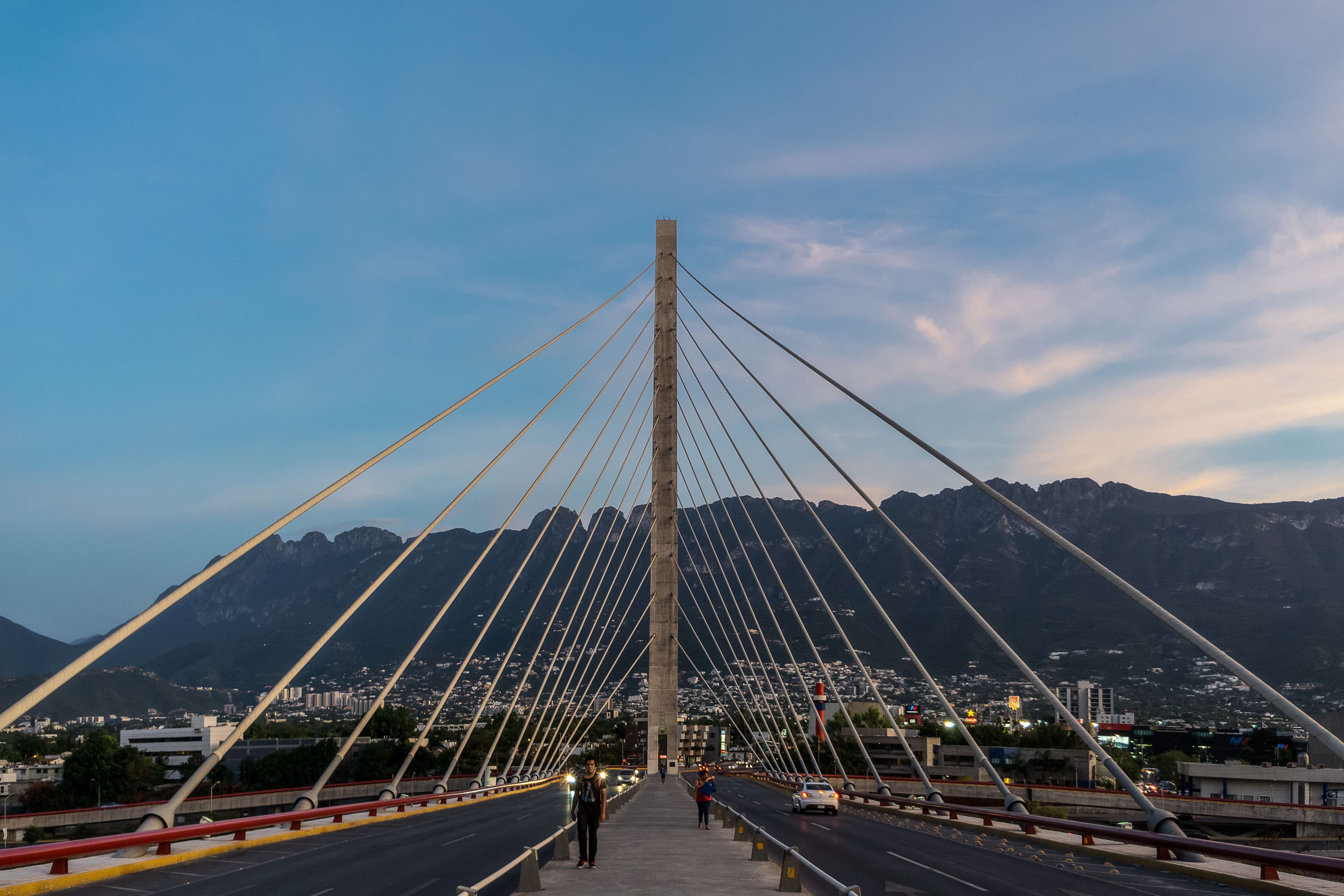 Puente Atirantado o Puente de la Unidad